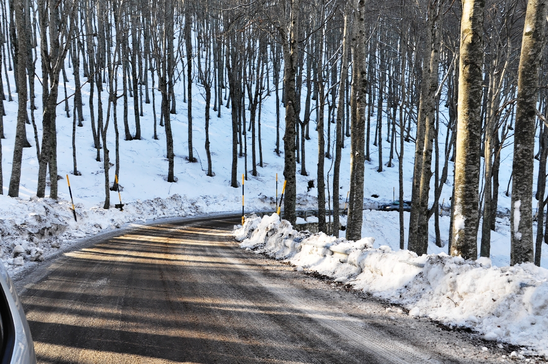 Majella National Park Winter 2013